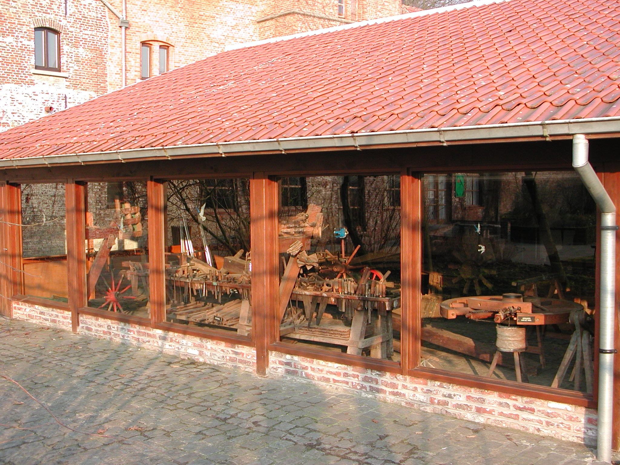 Zicht op de toenmalige ingerichte wagenmakerij op het domein Lippensgoed-Bulskampveld (2001).